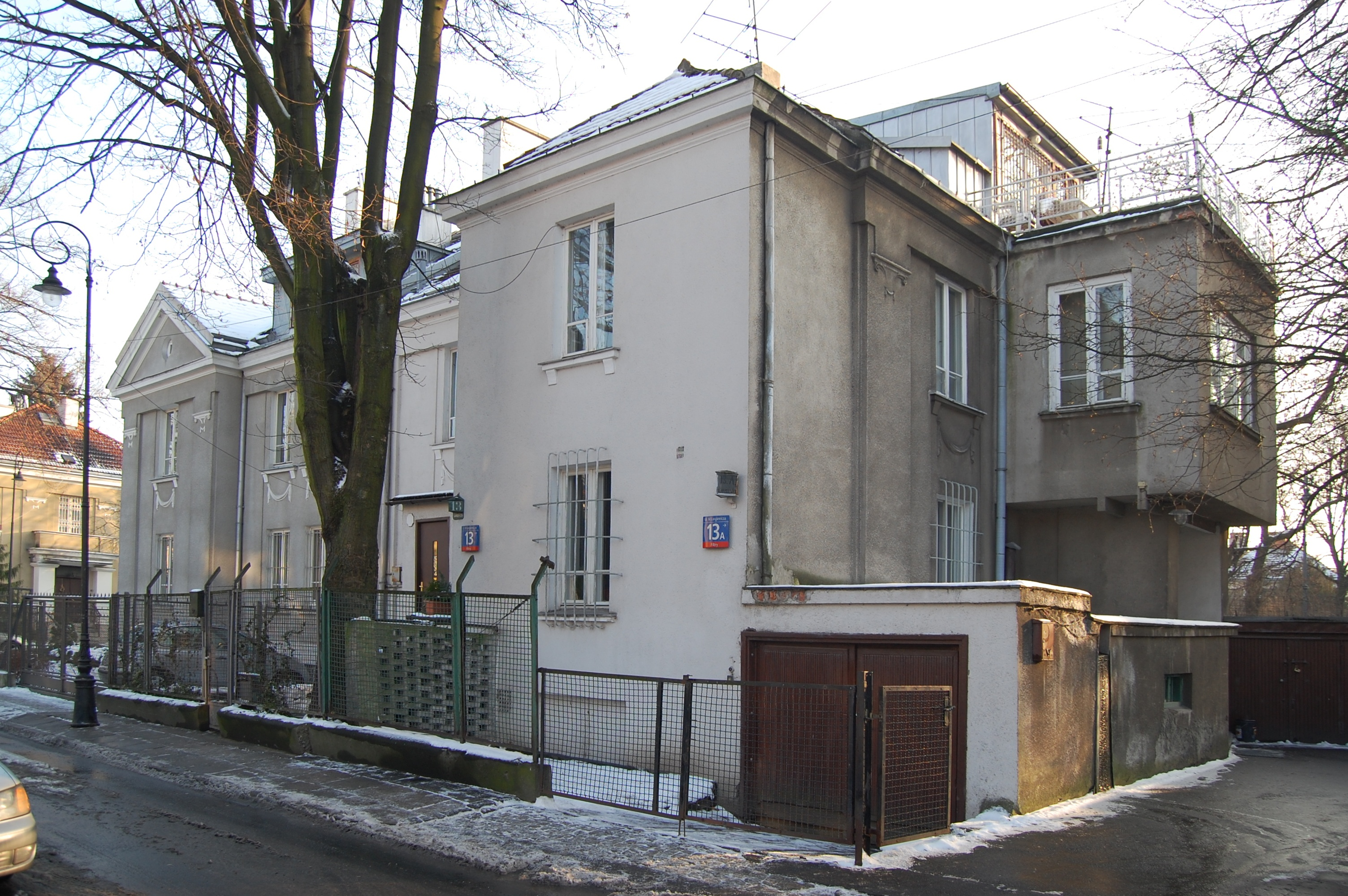 Dom przy ulicy Mariana Langiewicza 13 w Warszawie.